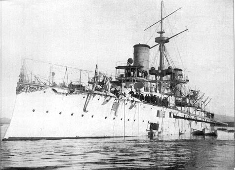 Cruiser ARA General Garibaldi